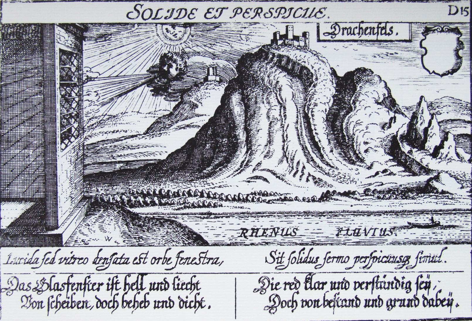 Kupferstich von Matthäus Merian für Eberhard Kiesers „Schatzkästlein“ zeigt den Drachenfels (mit noch unzerstörter Burg) und die noch vorhandene Burg Wolkenburg nahe Königswinter, Nordrhein-Westfalen. Rutschen zum Abtransport der Steine aus den Steinbrüchen sind gut zu erkennen. Die Abbildung von Burg Wolkenburg ist vermutlich die einzige mit einer gewissen Verlässlichkeit.